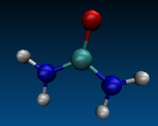 Molekula ureae vizualizirana preko programa VMD koristeći CPK reprezentaciju.